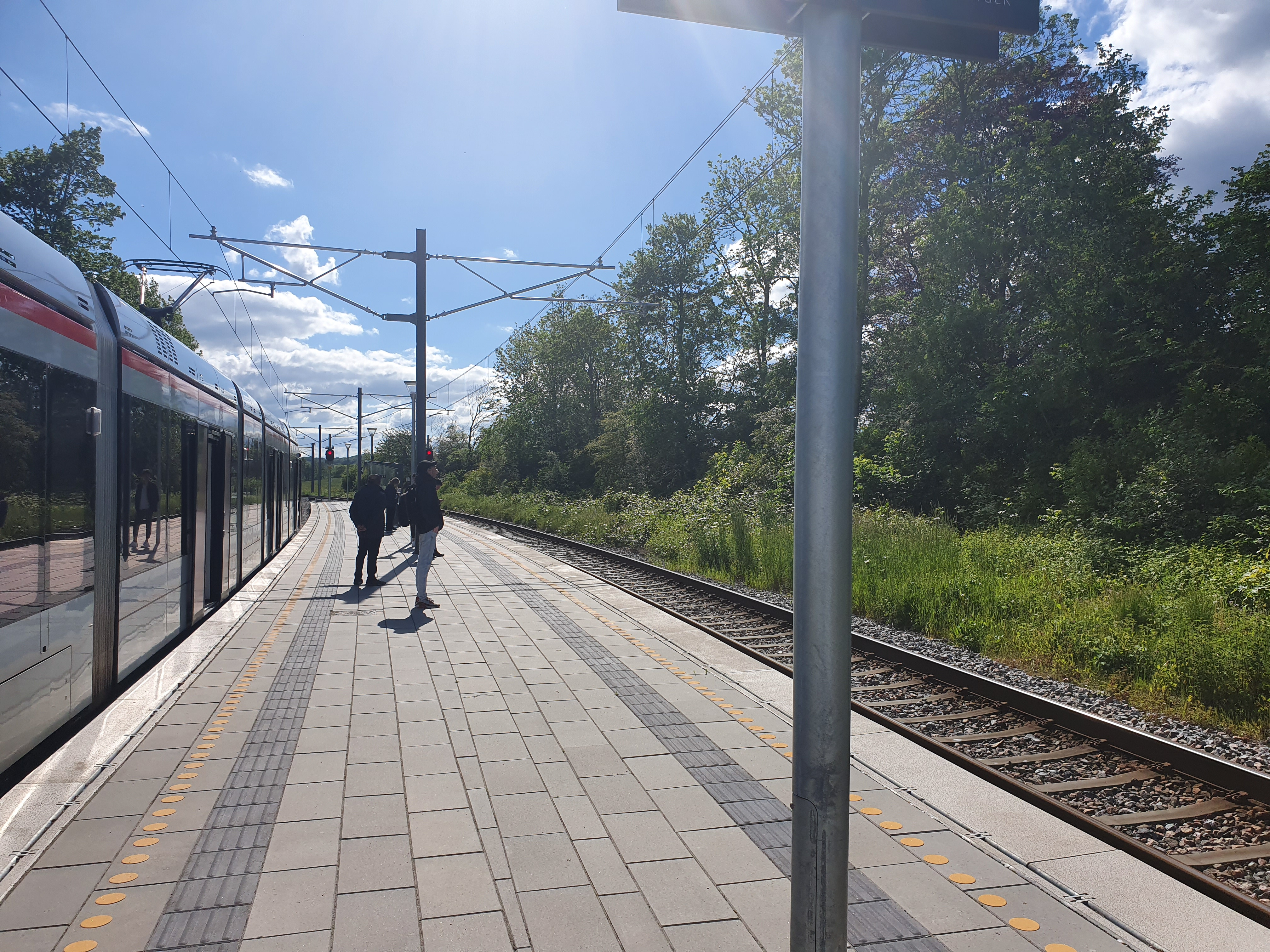 Assedrup station med Letbanetog og passagerer, 28. maj 2019